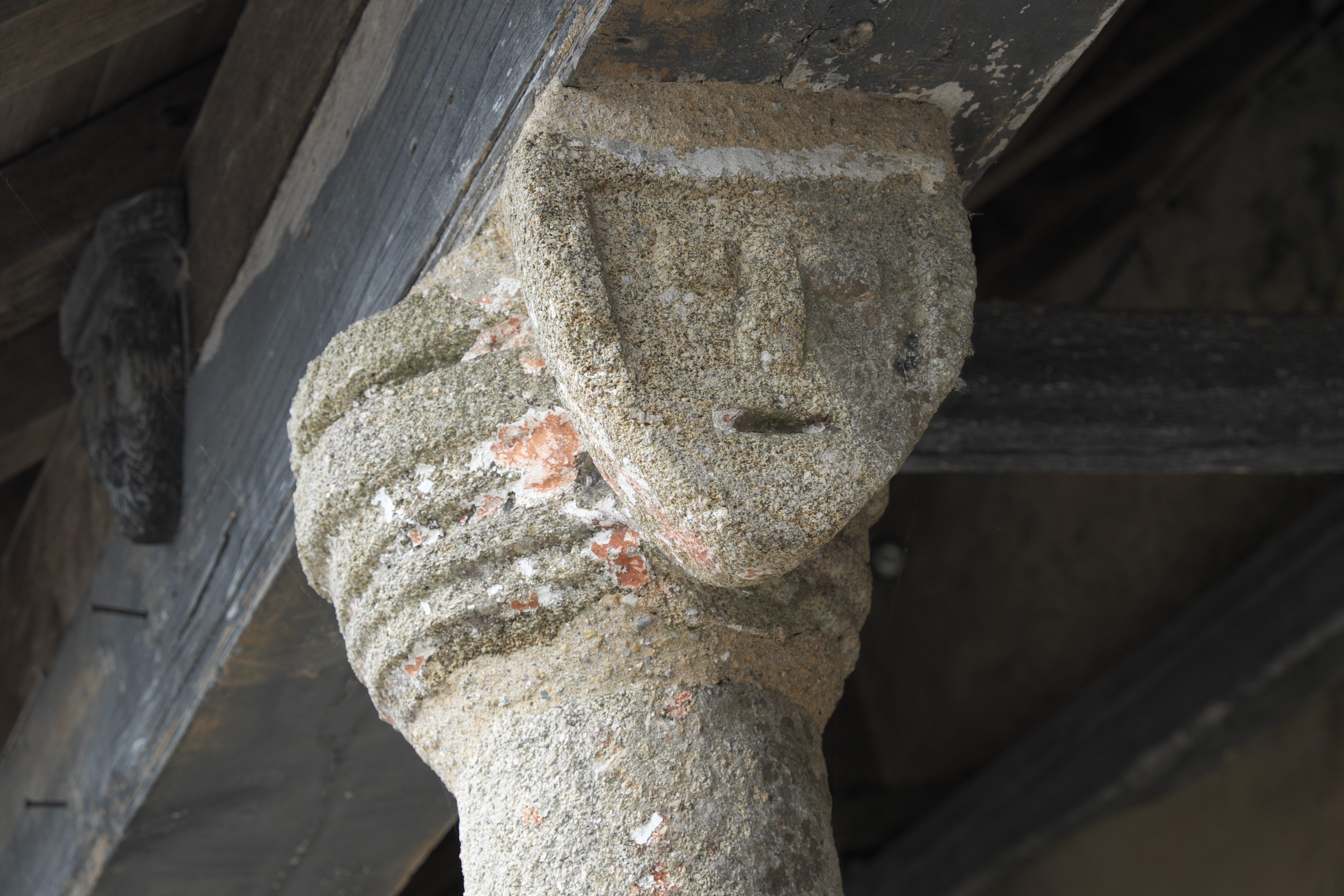 Katholische Pfarrkirche Ste-Trinité (Dreifaltigkeitskirche) in Calan im Département Morbihan (Region Bretagne/Frankreich), Galerie an der Südseite